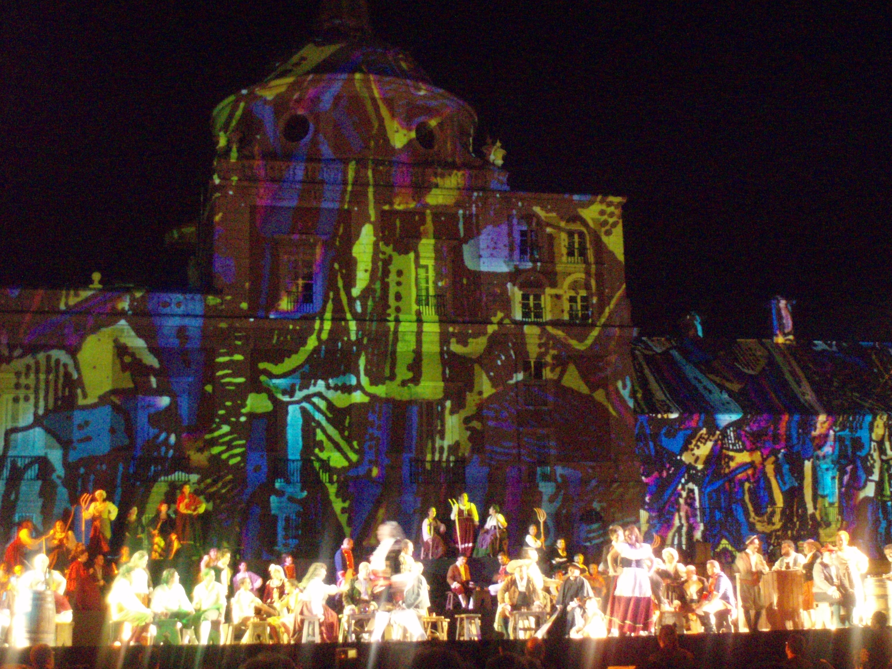 Imagen culmen de la escena que da paso a al Motín propiamente dicho. Aparece el pueblo en escena con el Palacio Real de fondo. Pertenece a la representación del Motín de Aranjuez celebrado el 11 de septiembre de 2006, en su 25º aniversario. El Palacio aparece decorado con imágenes reflejadas sobre su fachada y estructura. La representación está declarada de interés turístico nacional. Author: Fer.filol